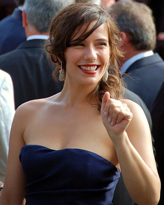 Zoé Félix au festival de Cannes